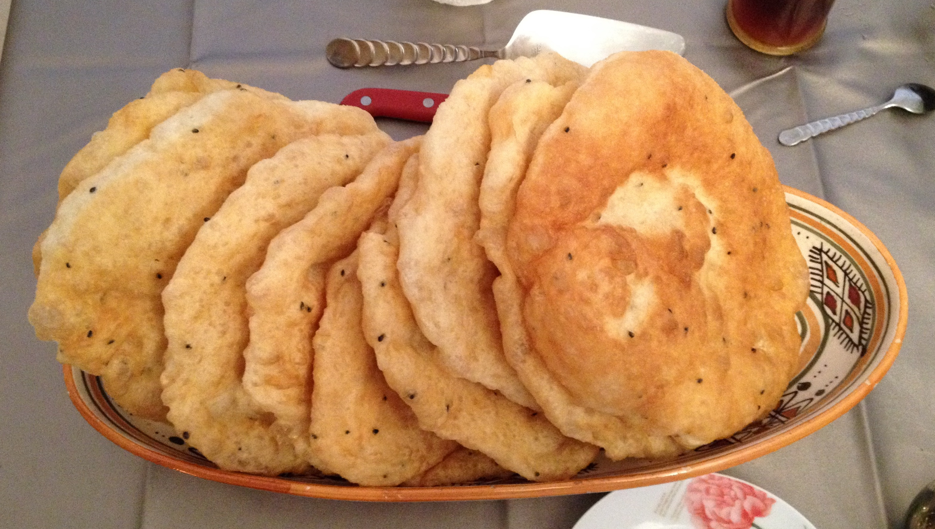 Khfaf de Kabylie